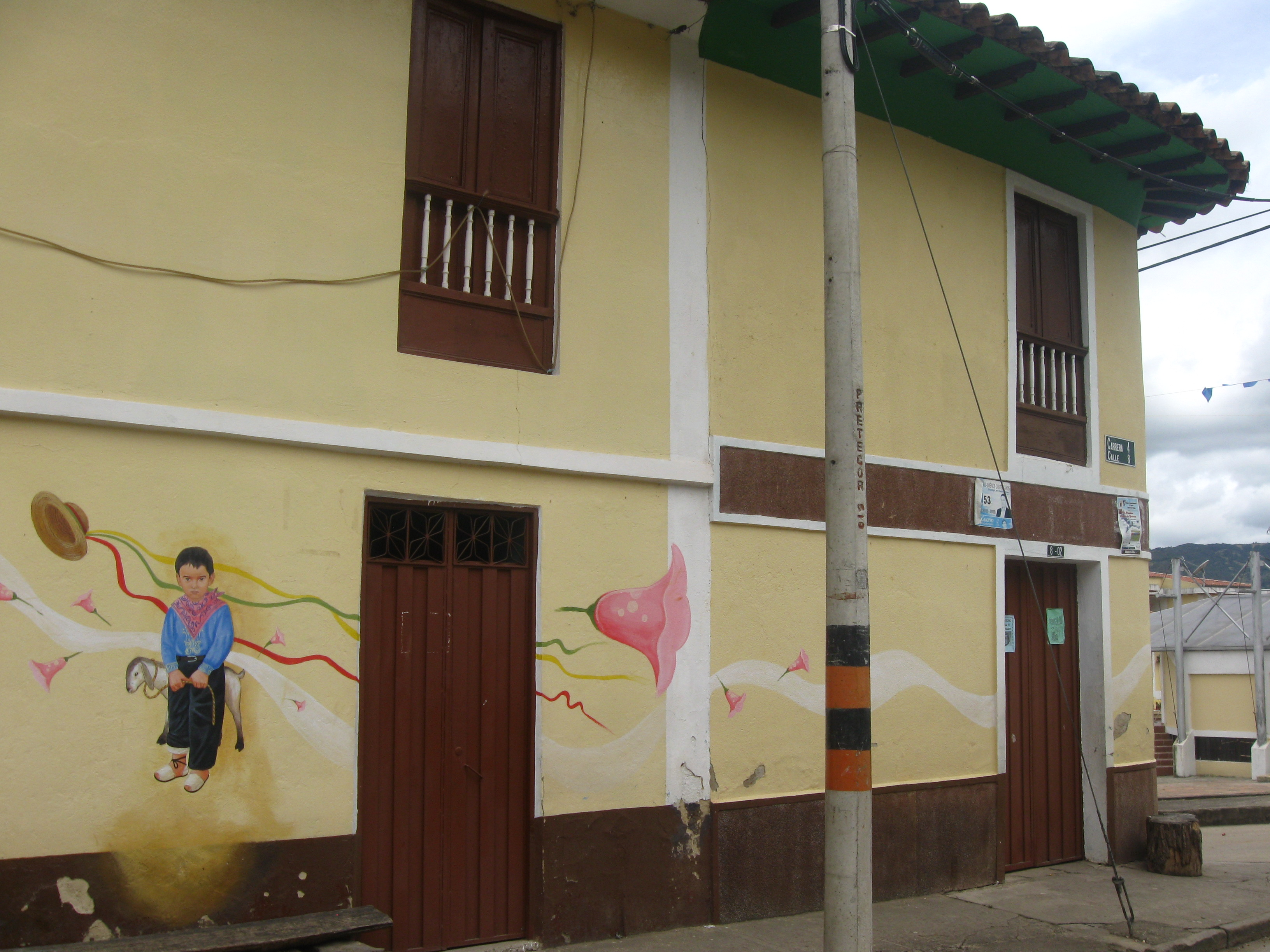 Calle de Sativanorte, Boyaca, Colombia. Muestra de la arquitectura de este pueblo.